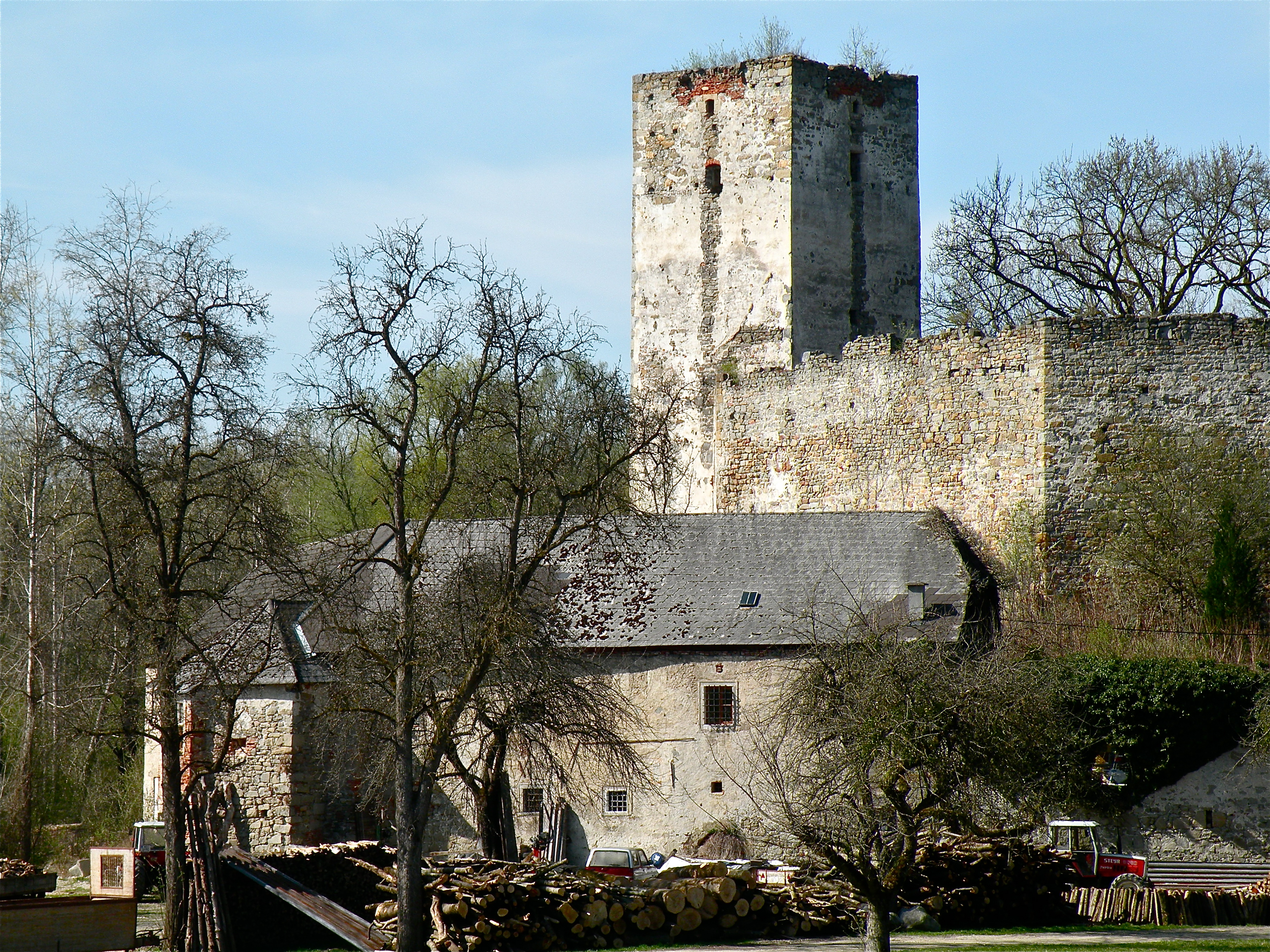 Burgruine Spielberg in Langenstein im Bezirk Perg in Oberösterreich.